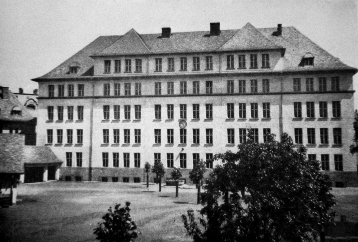 Historische Aufnahme zur Eröffnung 1921